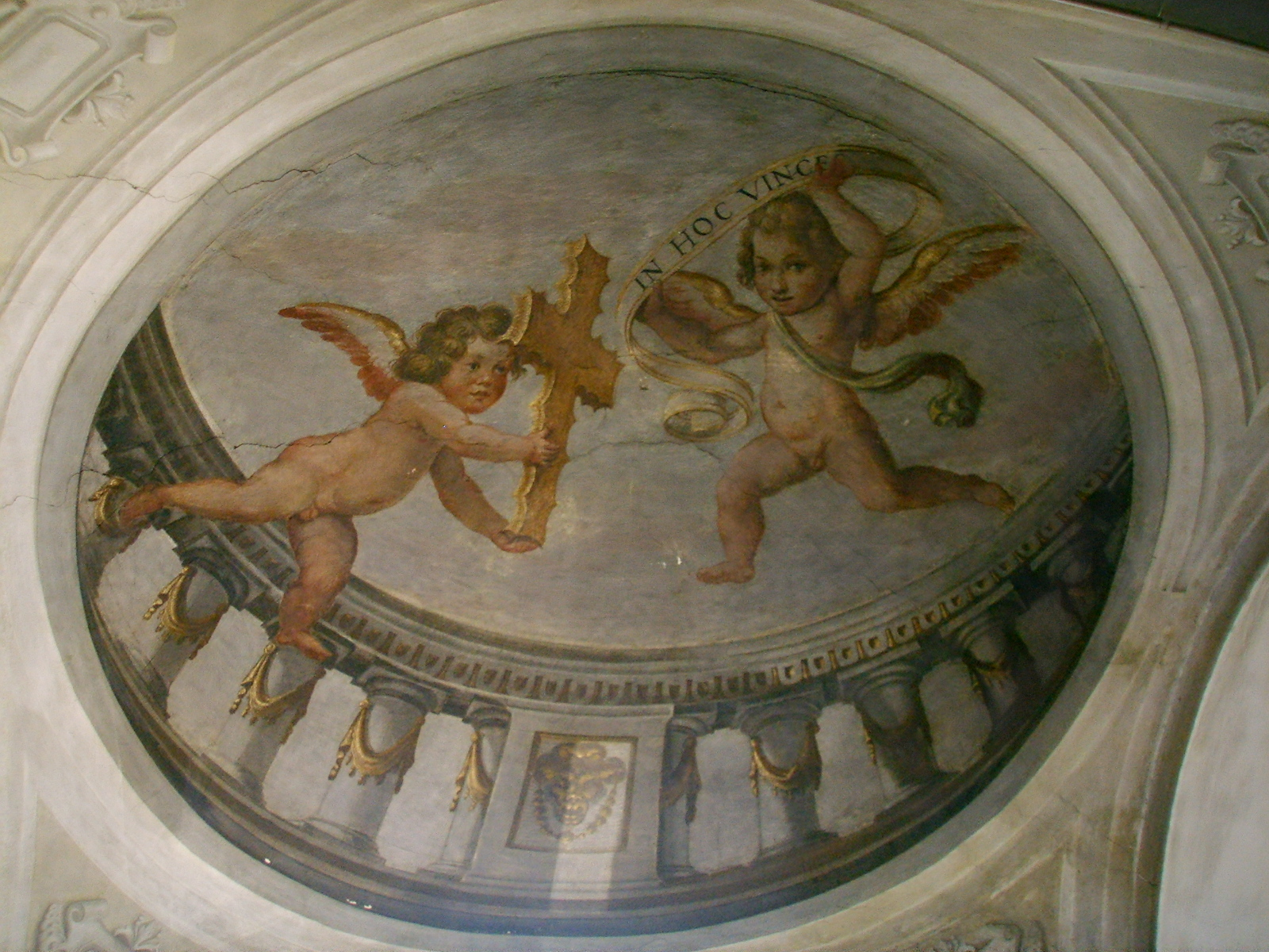 Palazzo_di_San_Clemente,_ affreschi vano_scale in Florence